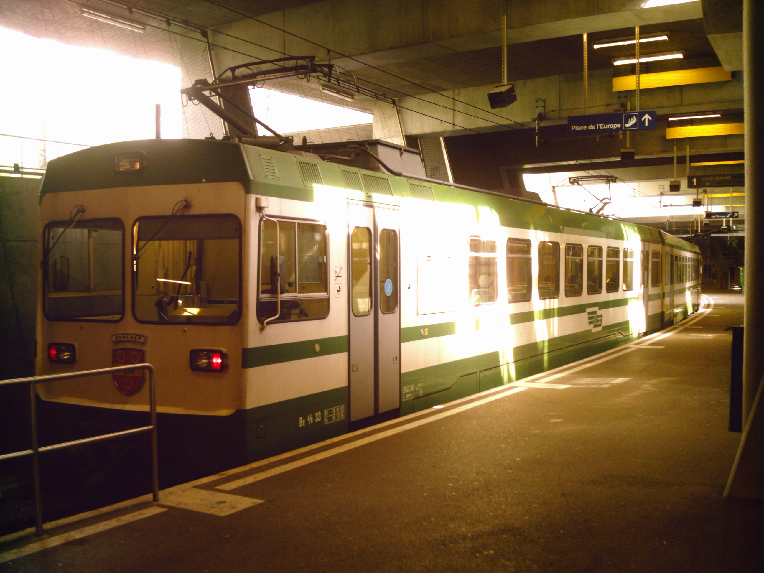 Une rame du LEB en gare de Lausanne-Flon.